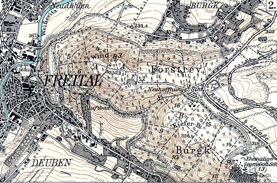 Geländedarstellung: Gebiet des Windbergs (Freital, Sachsen), Meßtischblattdarstellung (1:25.000) This is a part of an old atlas. It does not represent the current situation.